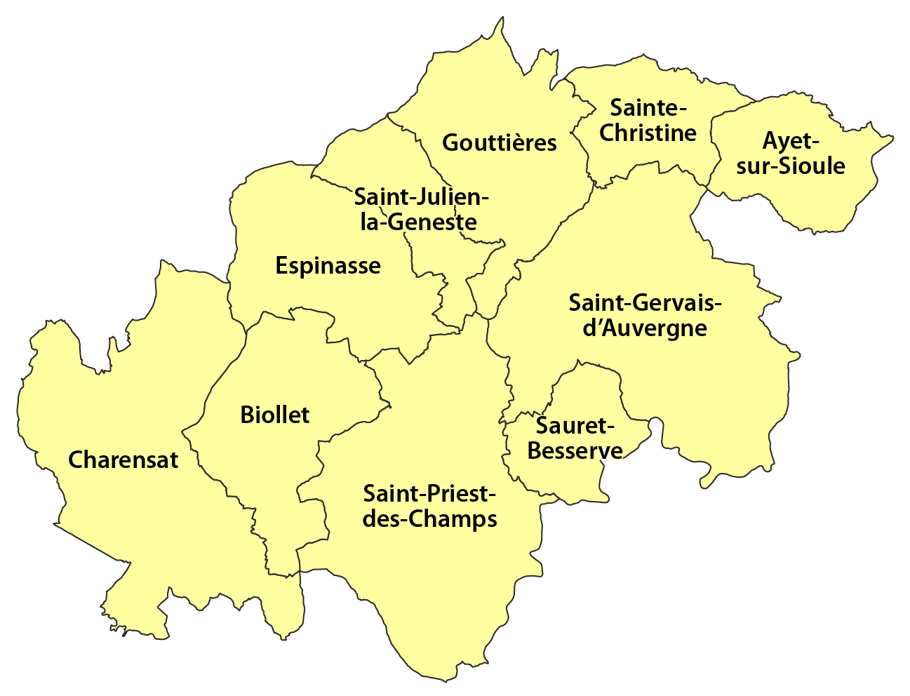 Karte der Gemeinden im Canton Saint-Gervais-d'Auvergne